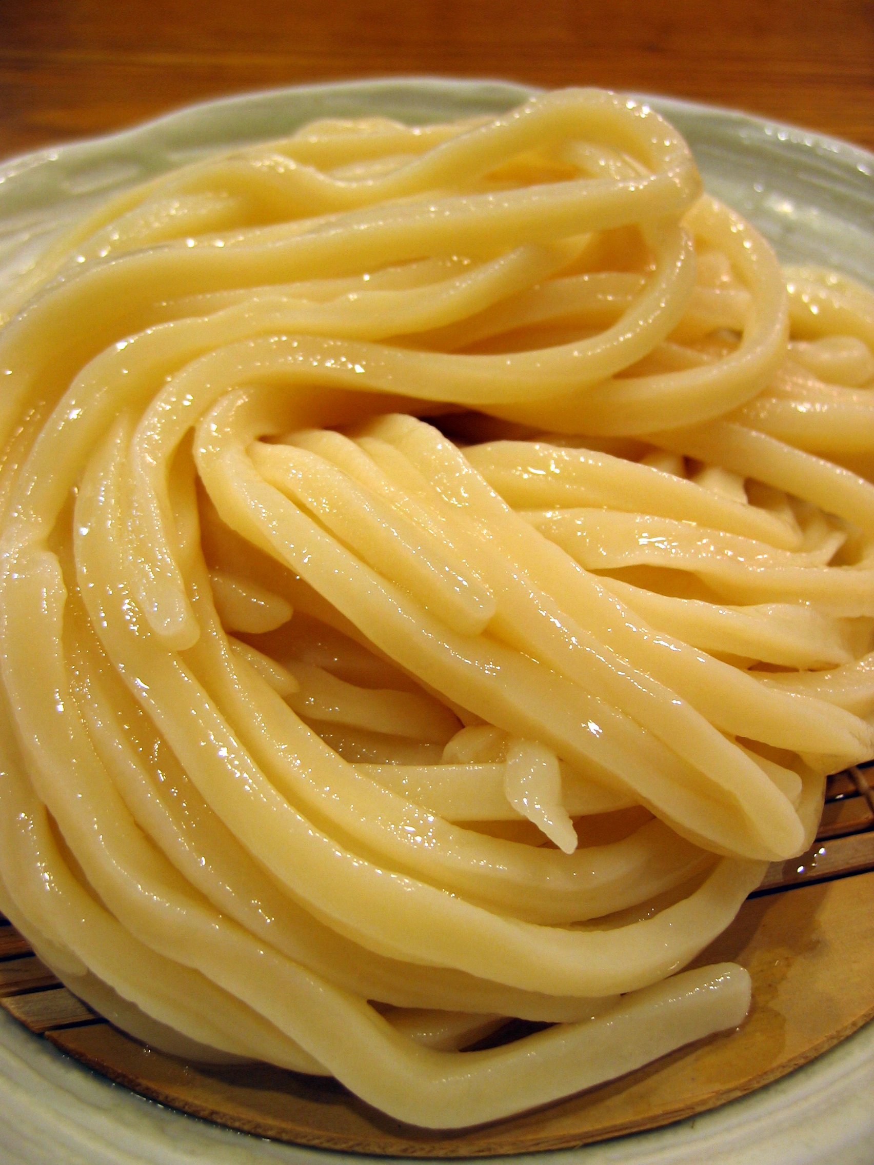 夢庵